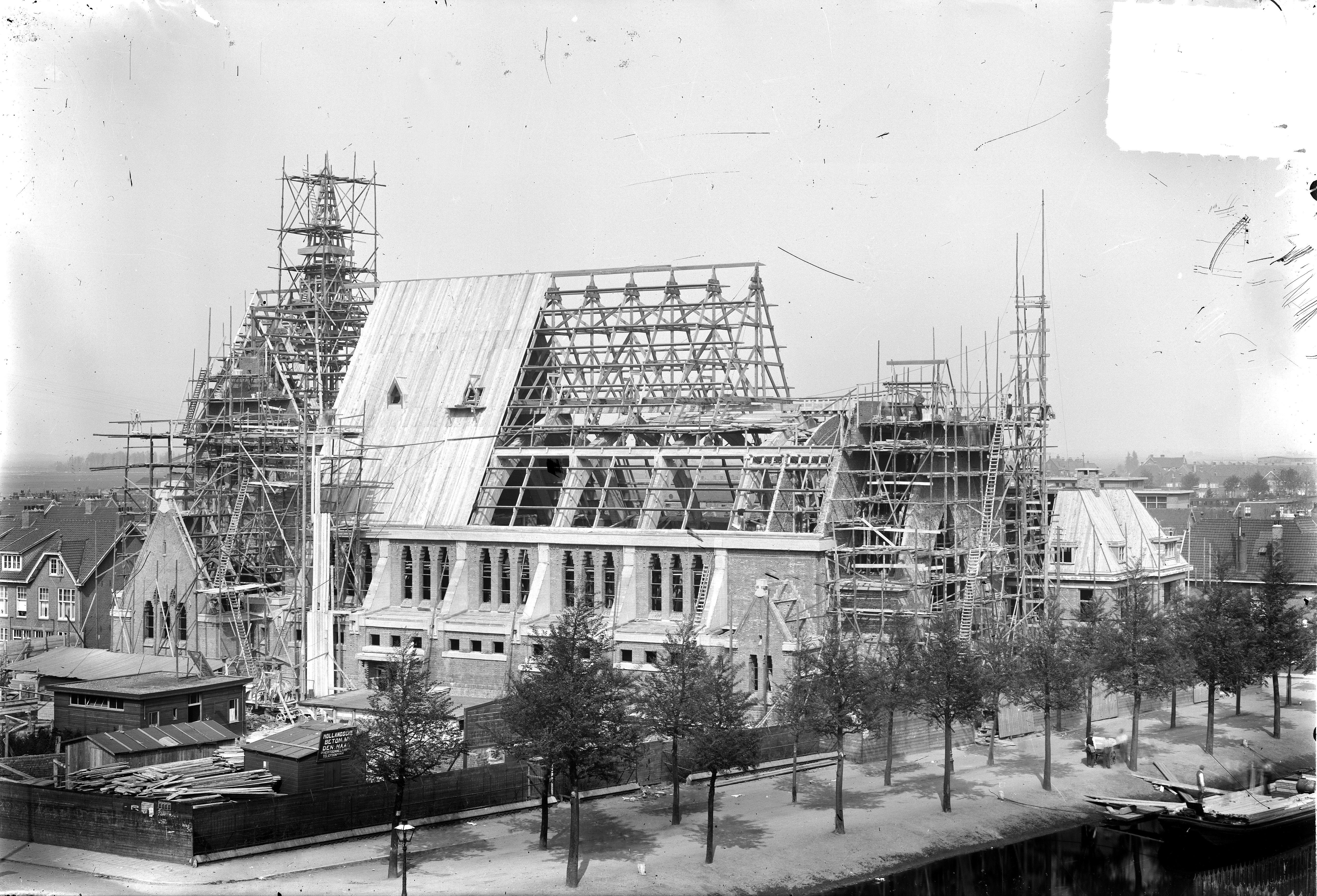 Gezicht op de bouw van de Sint Josephkerk, aan de wal een schuit met bouwmaterialen.